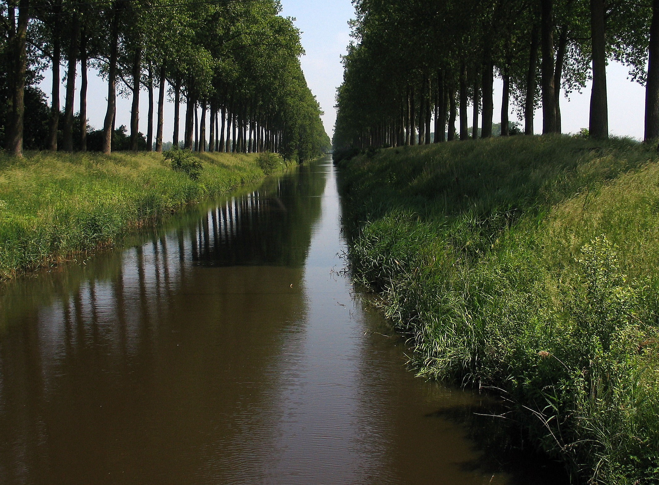 Het Leopoldkanaal in Sint-Laureins (België)